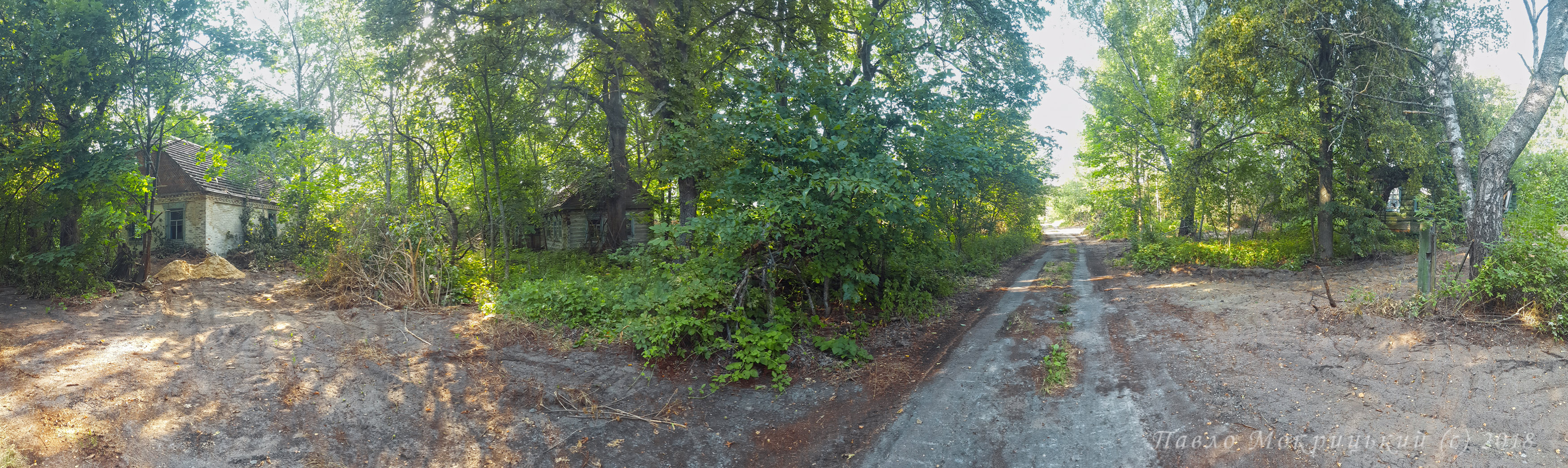 Панорама в центрі с.Звіздаль, на виїзді до става